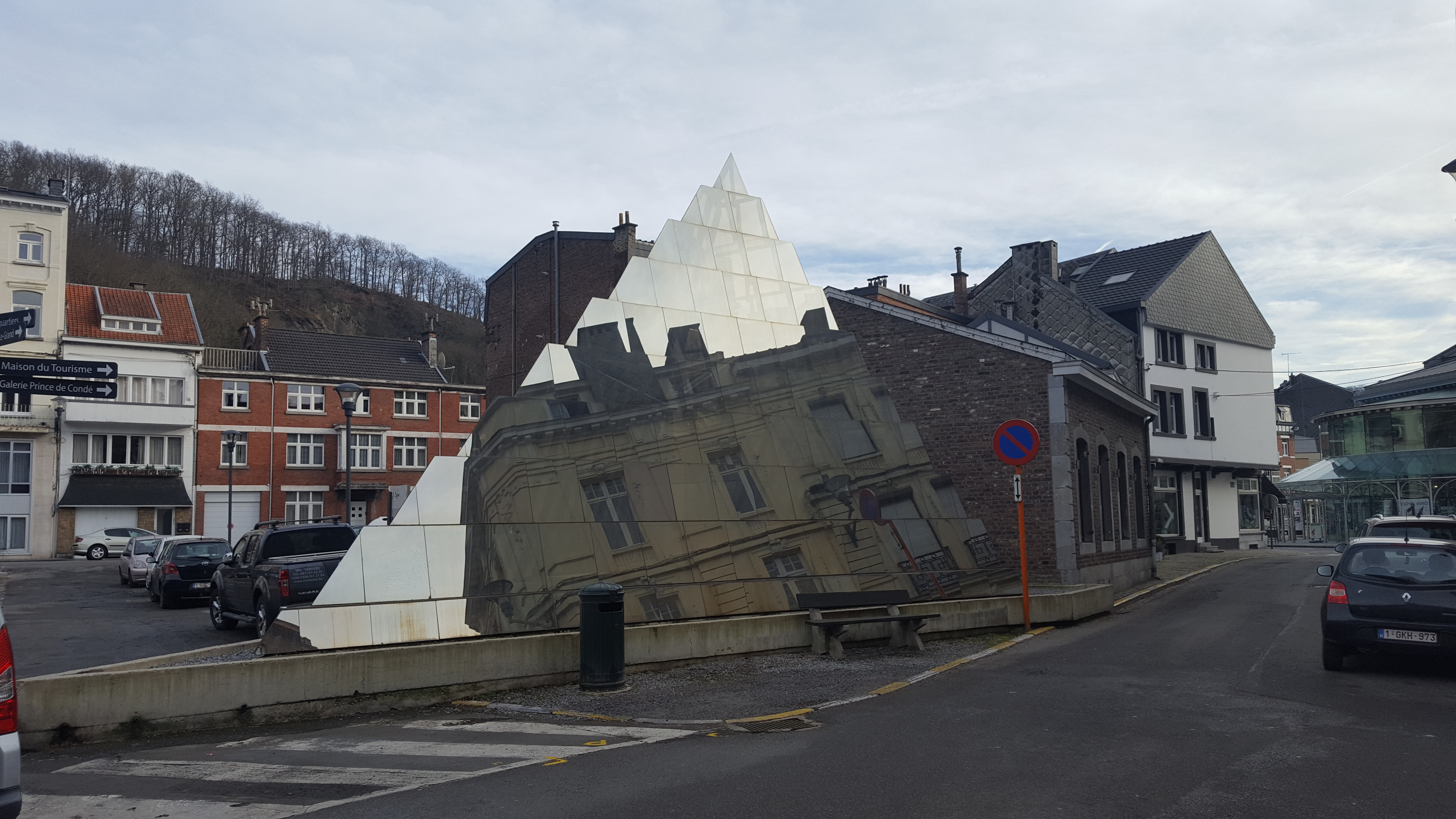 Source du Prince de Condé, Spa, Belgique